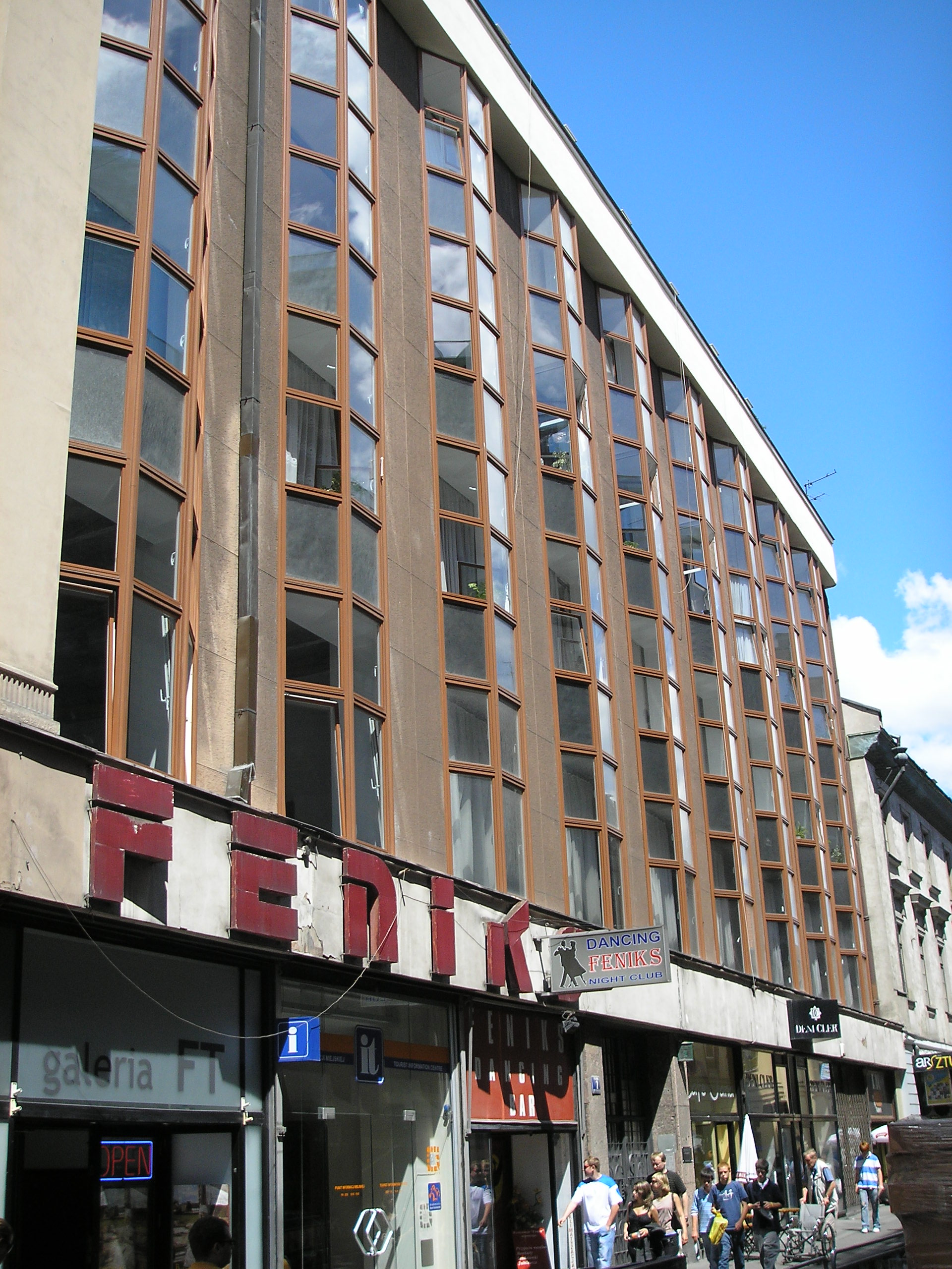 Feniks (Phoenix) building in Kraków